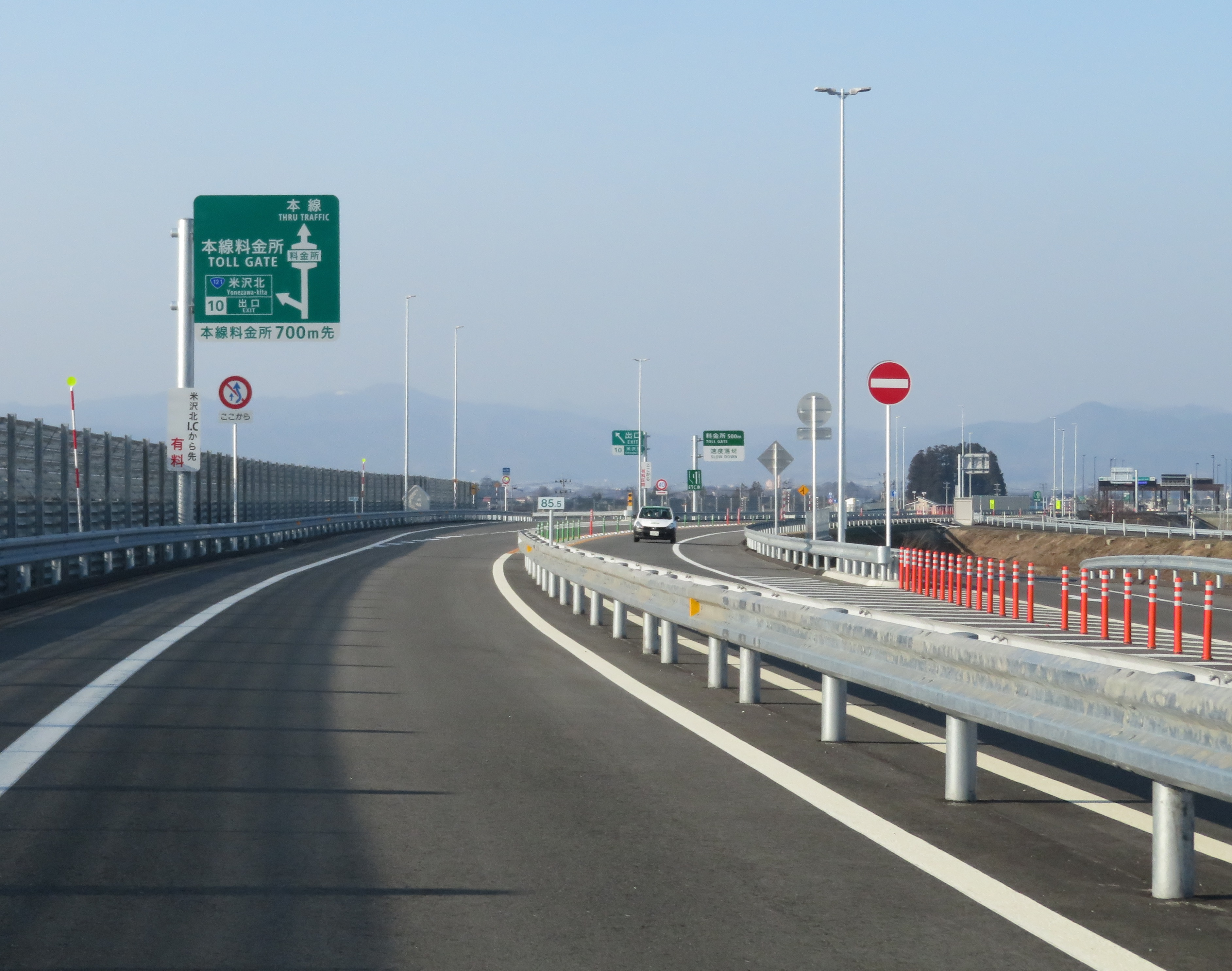 東北中央自動車道米沢北ＩＣ出口付近（福島方面側から撮影）